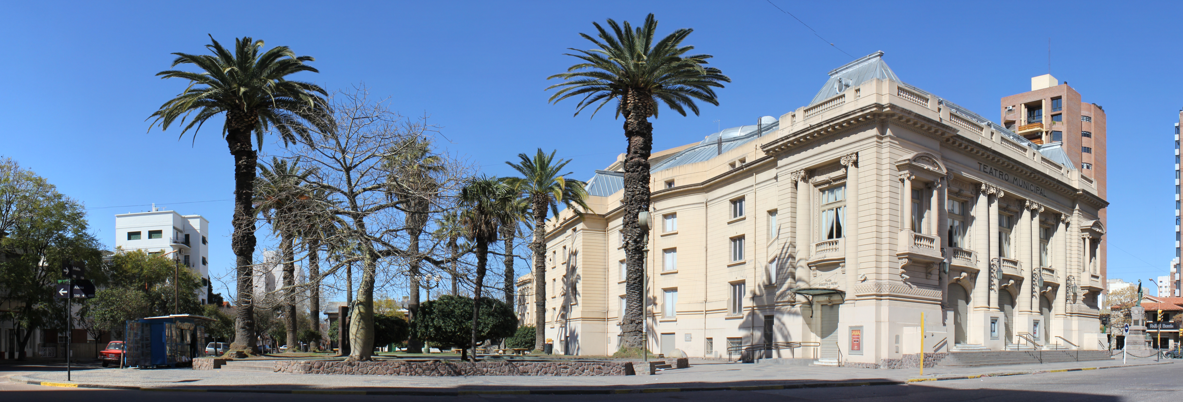 Teatro Municipal y Plazoleta Payró, situados en la ciudad de Bahía Blanca, Buenos Aires, Argentina. Emplazados entre las calles Alsina, Zeballos, Portugal y Dorrego.